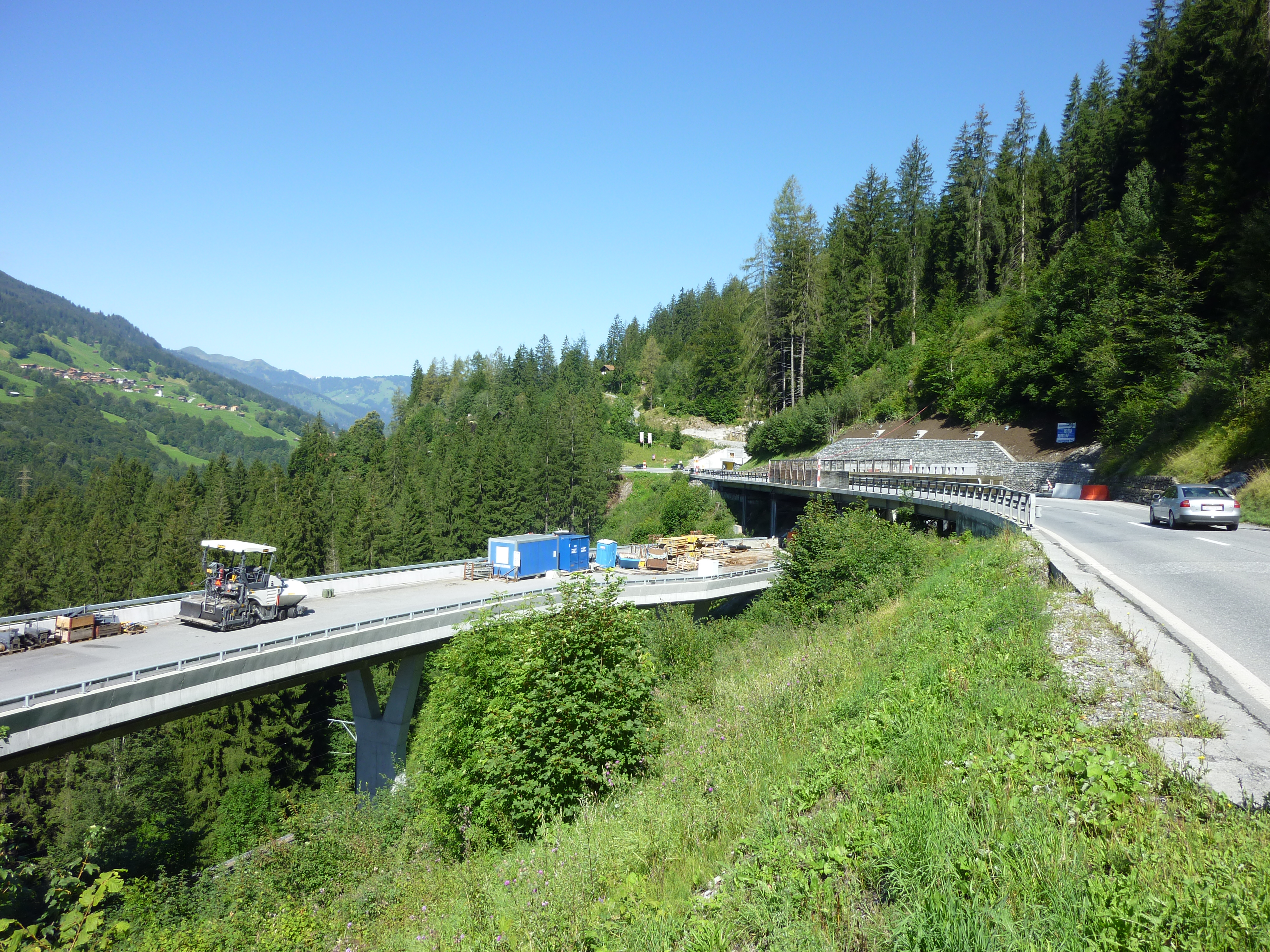 Südliches Ende der Umfahrung Saas